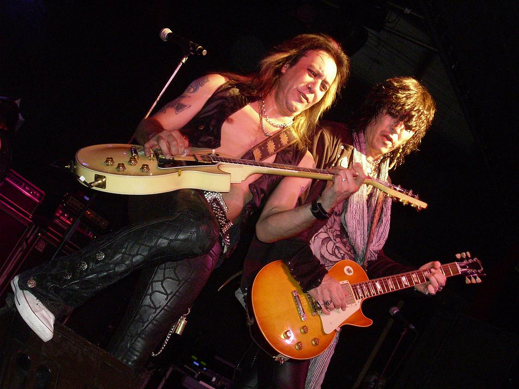 Emiliàn e rumagnòl: I Cinderella dal viṿ a Madrid